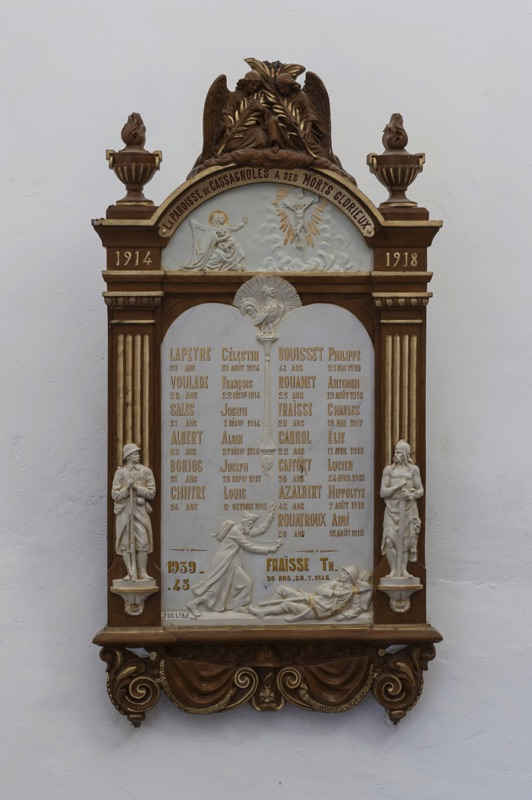 Monument aux morts - Archives départementales de l’Hérault - FRAD034-2637W-Cassagnoles-00001